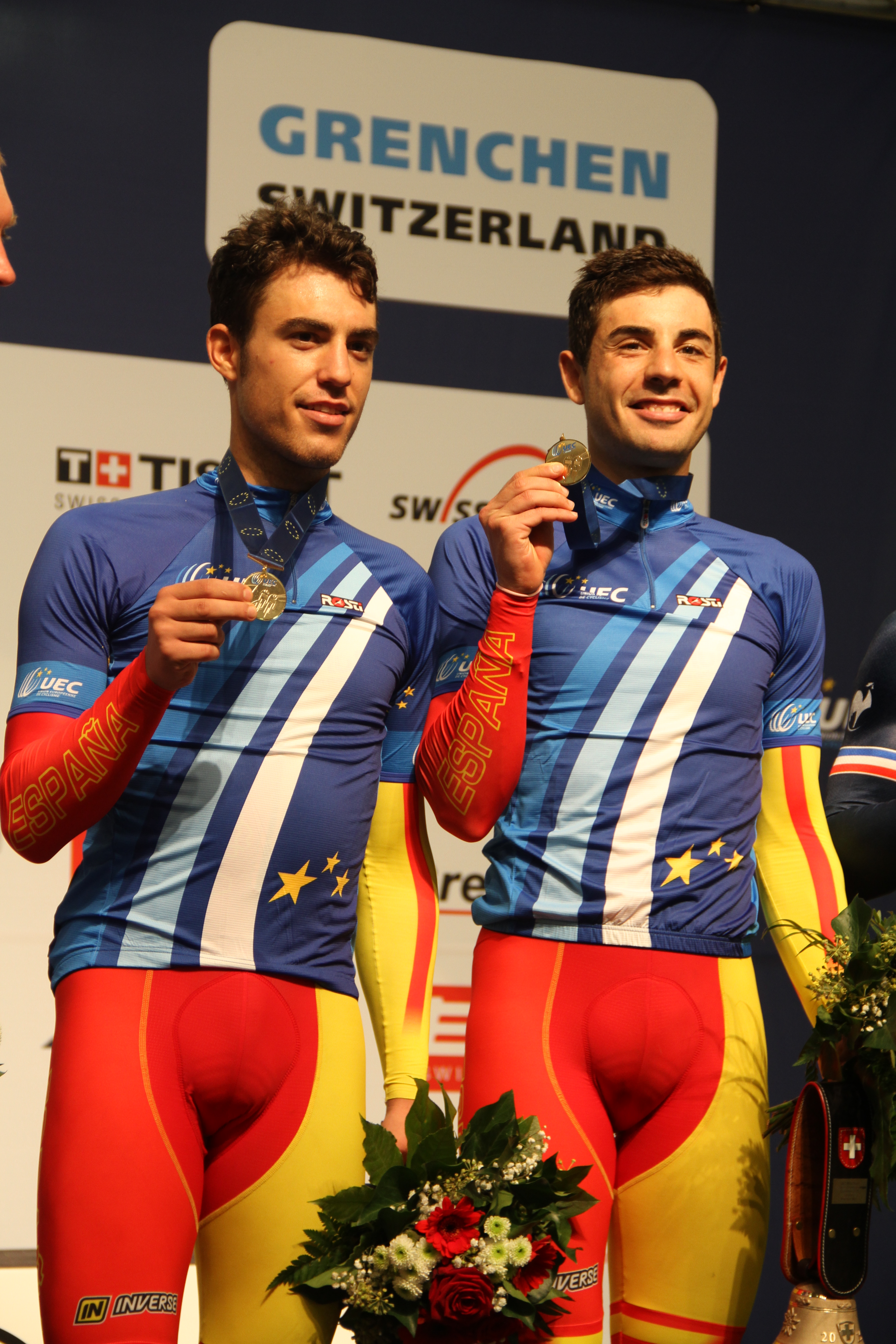 Albert Torres (l.) und Sebastían Mora, Europameister im Zweier-Mannschaftsfahren The making of this document was supported by the Community-Budget of Wikimedia Germany.